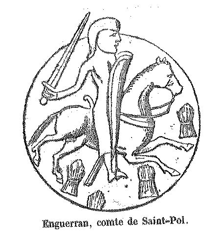 seal of Enguerran (Enguerrand, Ingelram), count of Saint-Pol (before 1150). "D’après les exemples que je viens de citer, le blason fait son apparition dans les dernières années du XIIe siècle, brusquement, sans transition. Mais il est d’autres types plus anciens où les pièces des armoiries existent, s’annonçant pour ainsi dire avant de passer dans l’écu. Le sceau d’Enguerran, comte de Saint-Pol, antérieur à l’année 1150, est de ce nombre. Il offre déjà plusieurs gerbes dispersées dans le champ. "